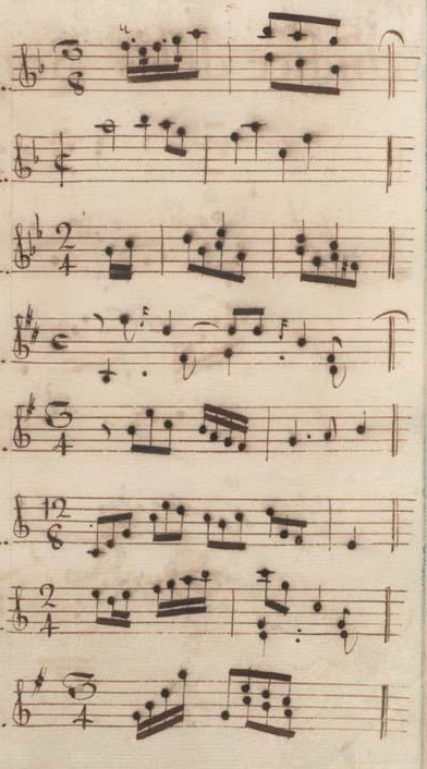 Table du volume II des manuscrits de Venise (incipit des sonates 23 à 30, K. 194 à 201).